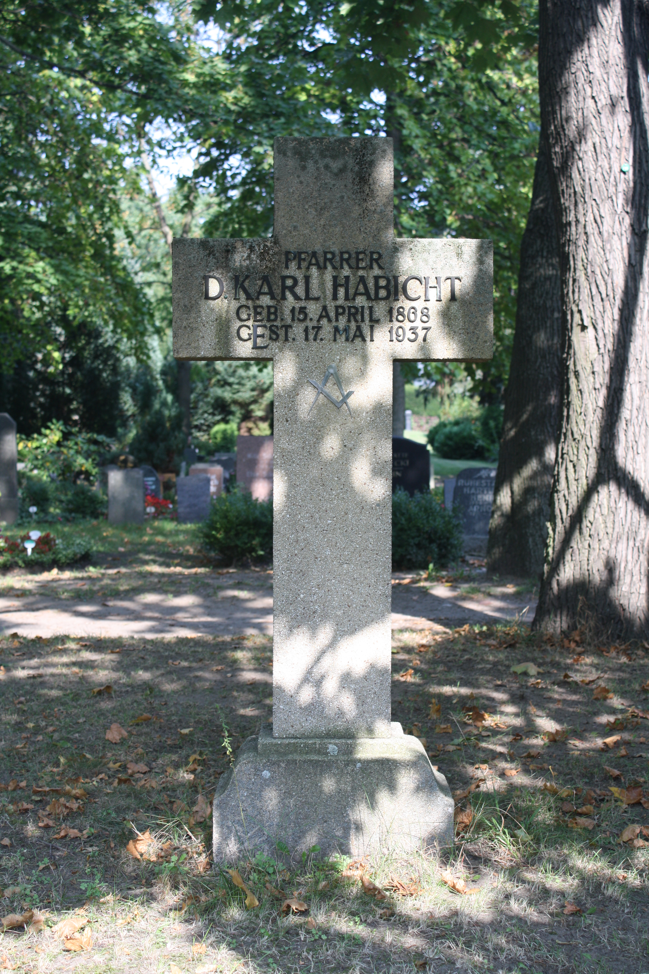 Grabmal Karl Habichts auf dem St. Petri-Luisenstadt-Kirchhof, Friedrichshain, Berlin